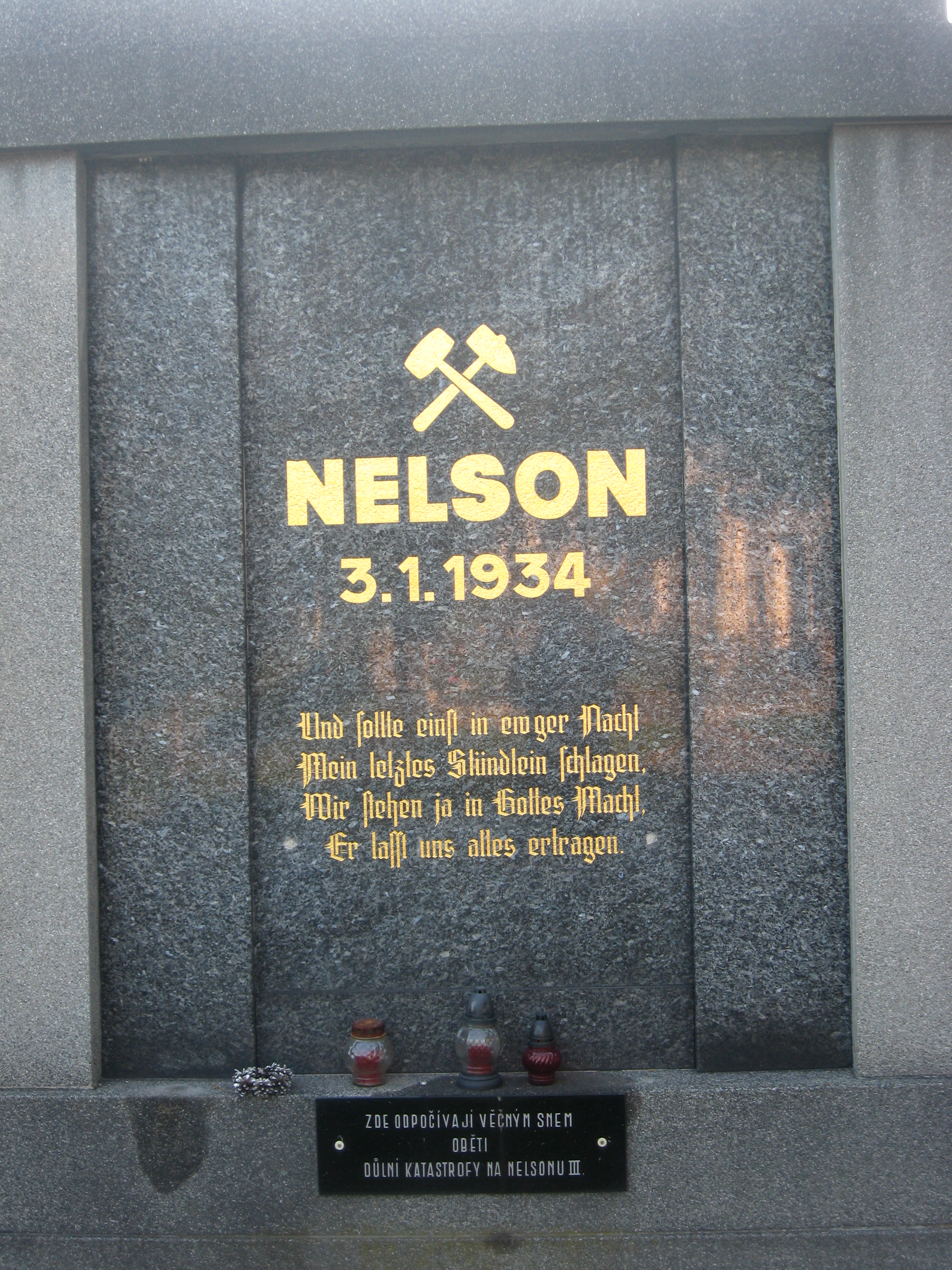 Duchcovský hřbitov